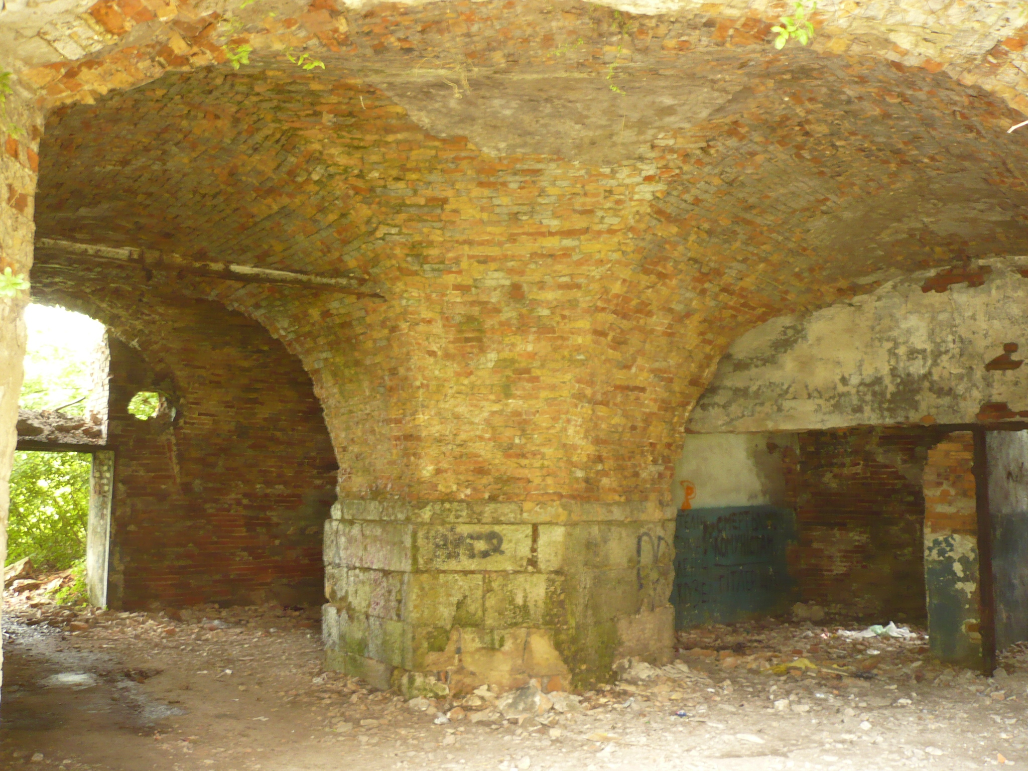 Kazamaty w Brodach